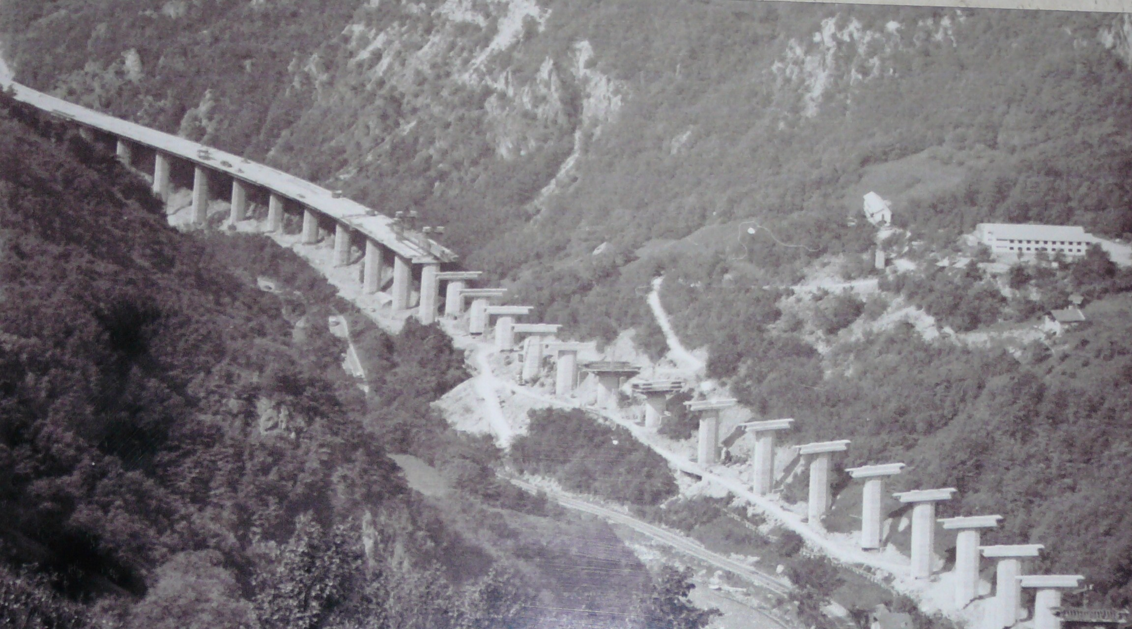 La costruzione del viadotto Campodazzo negli anni '70